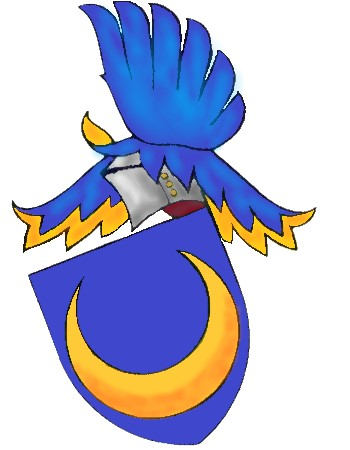 Erb Pánů z Vřesovic